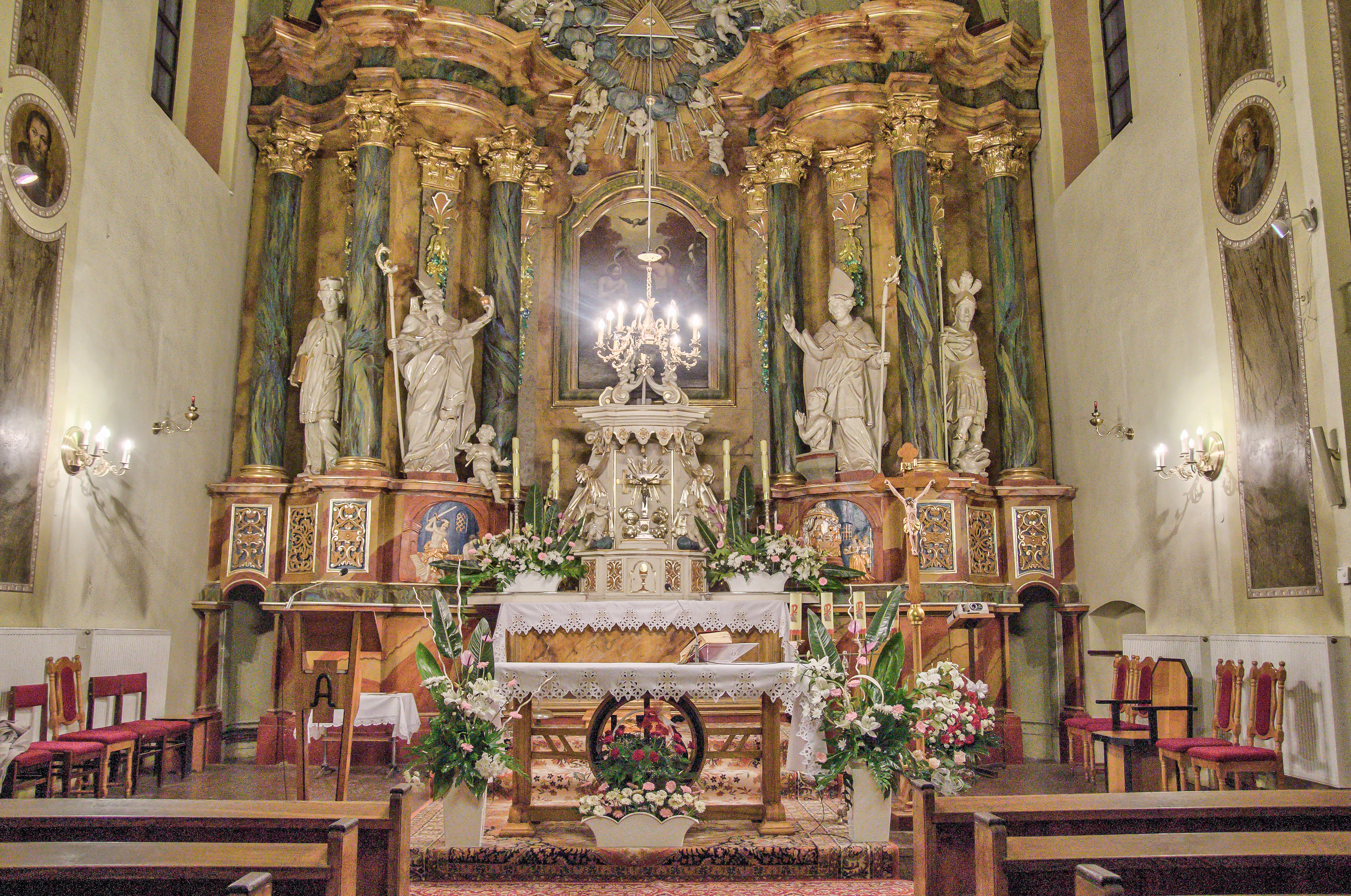 Główny ołtarz w kościele św. Jana Chrzciciela w Olsztynie.